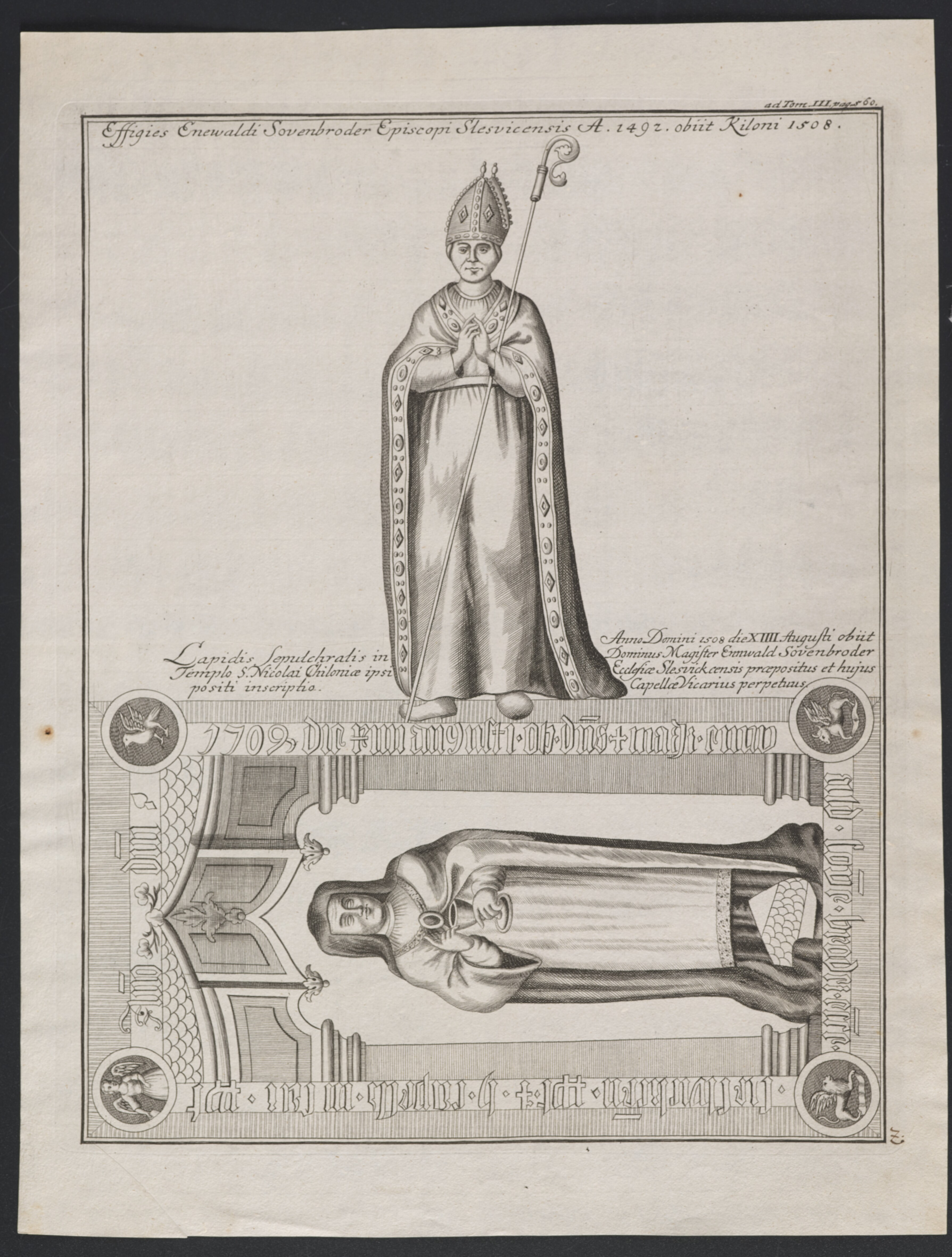 Tegning af biskop af Slesvig, Enewaldi Sovenbroders (d. 1504) ligsten. Billedsamlingen i Det Kgl. Bibliotek. Müllers Pinakotek 13, 8, II, 2°